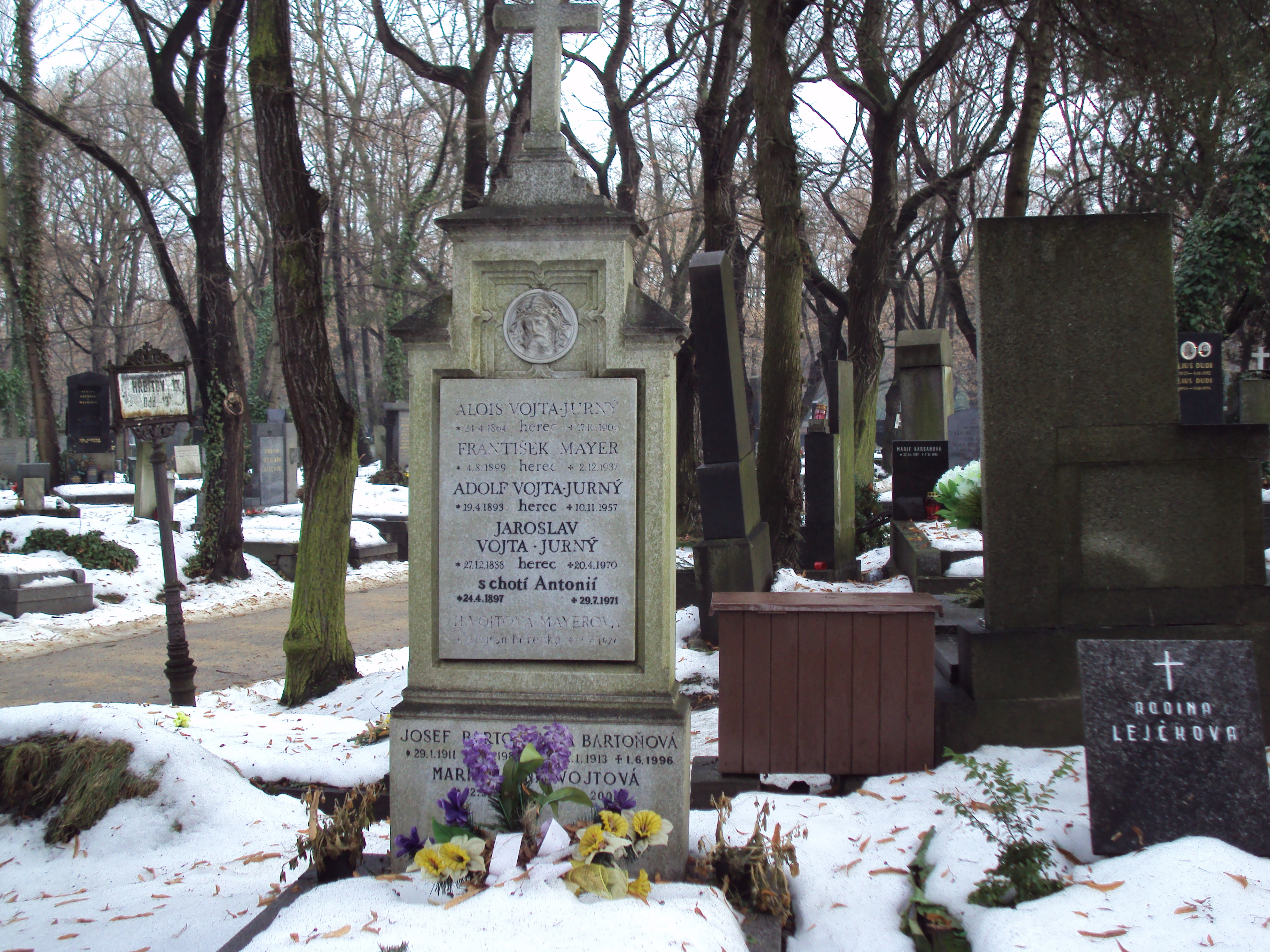 Hrob herce J. Vojty na Olšanech